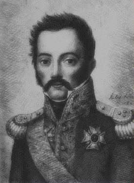 André Louis Élisabeth Marie Briche (1772-1825), général de division et baron de l'Empire.